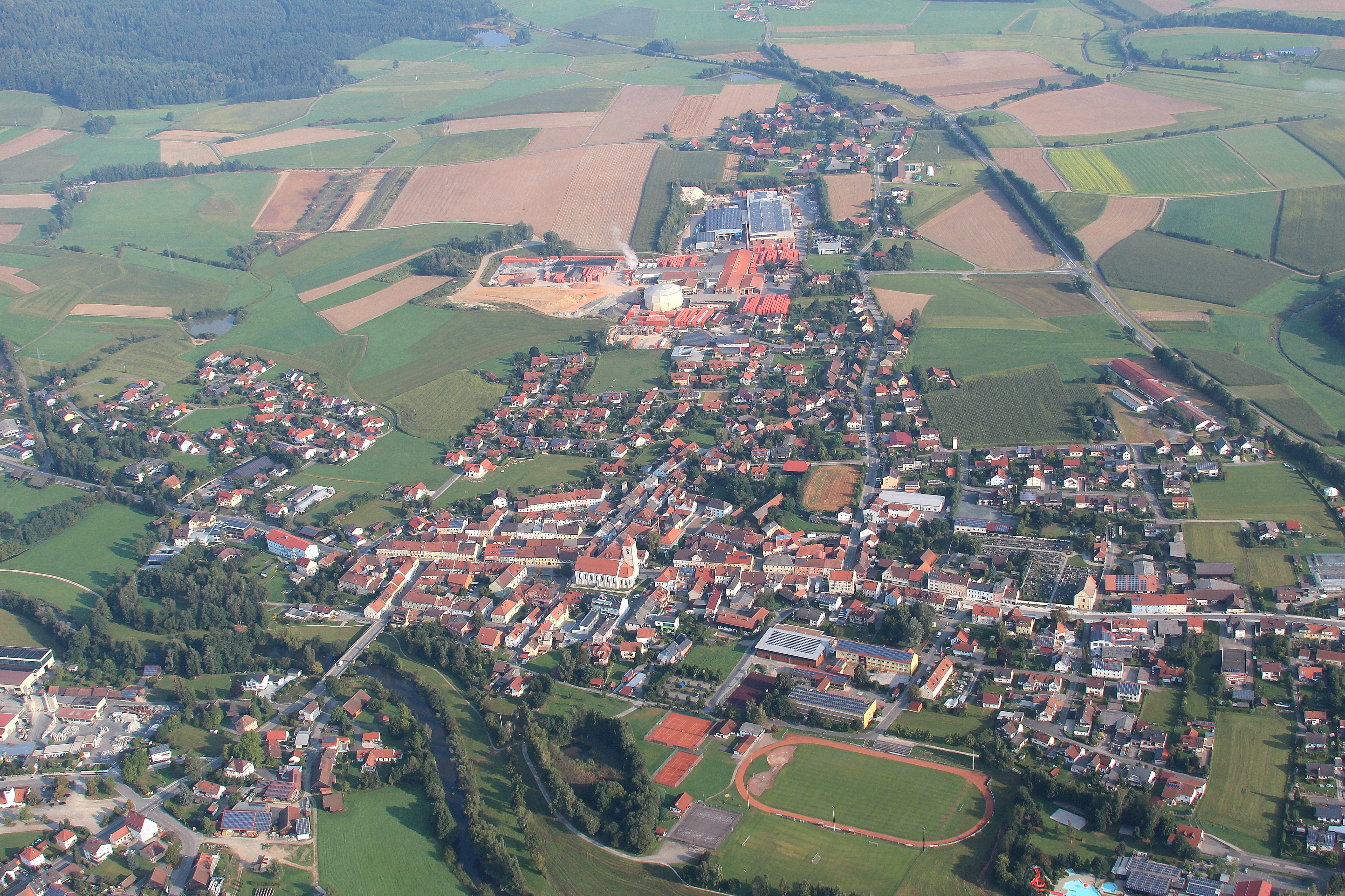 Rötz am Fluss Schwarzach; Landkreis Cham, Oberpfalz, Bayern